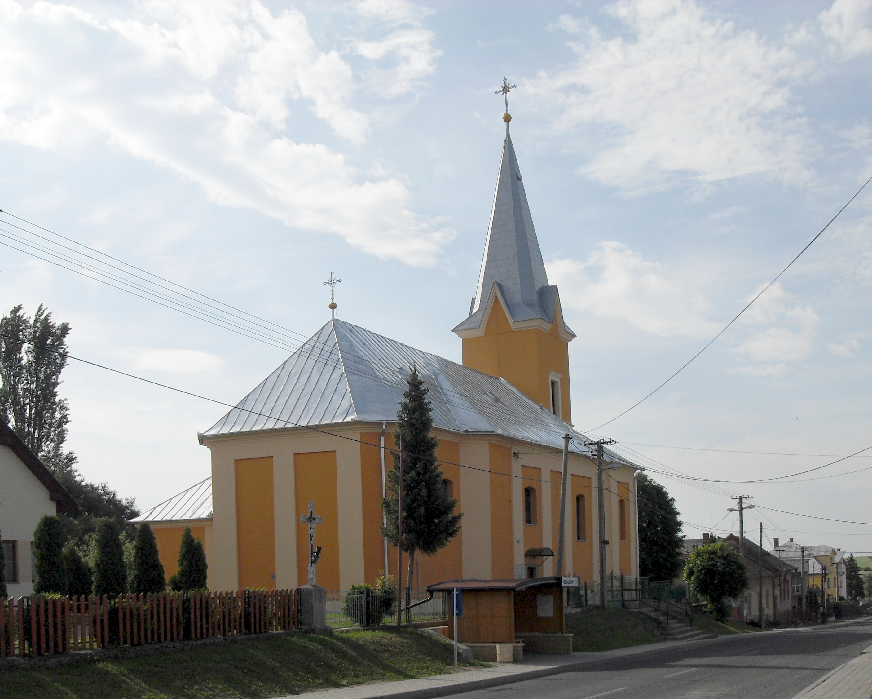 Nováčany, Rímskokatolícky kostol sv. Štefana